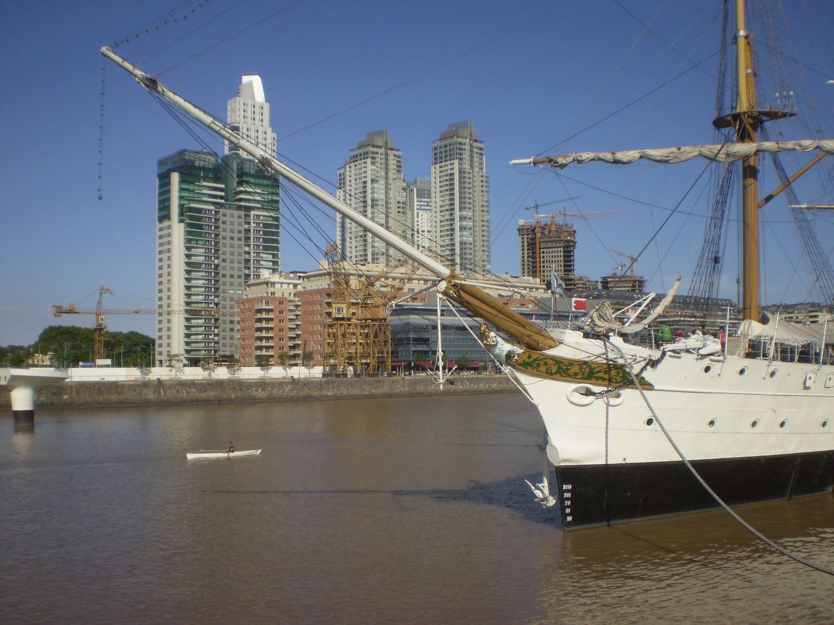 Buque Museo Fragata A.R.A. Presidente Sarmiento, amarrada en puerto Madero, Buenos Aires, Argentina (Mascarón de proa)